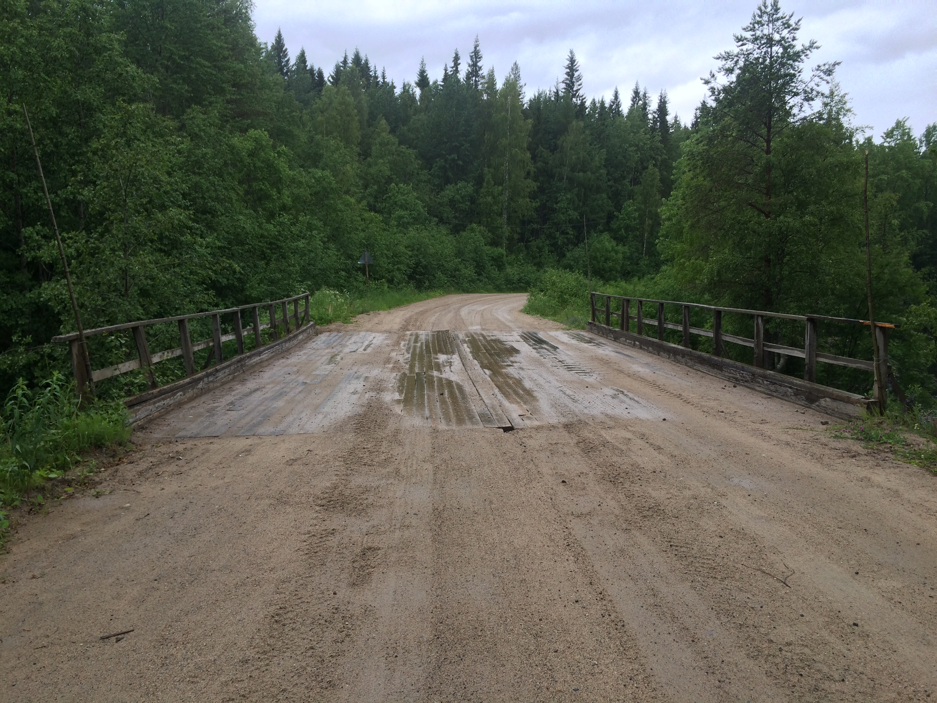 Гормозерка